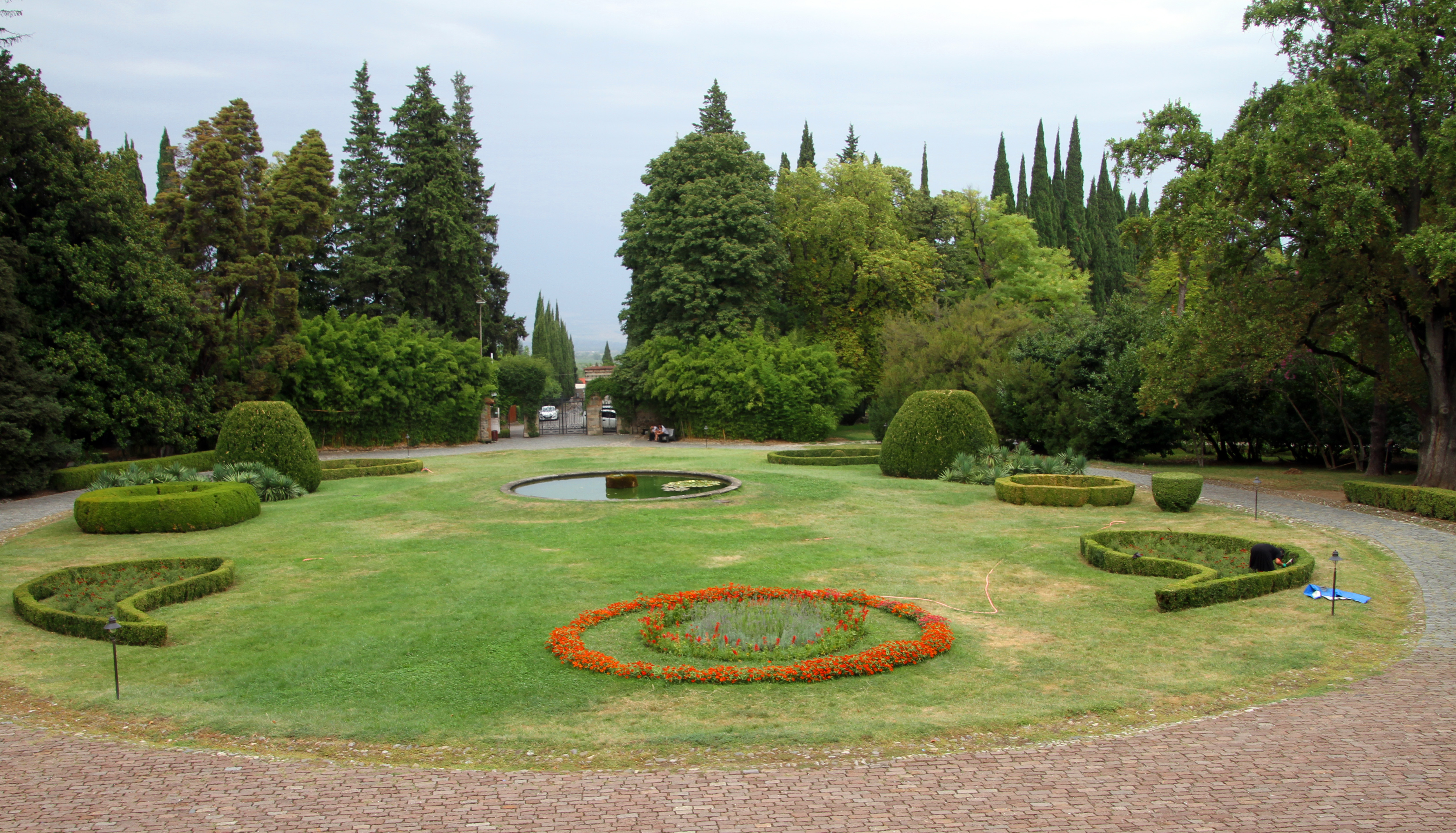 Tsinandali, Museum und Weingut